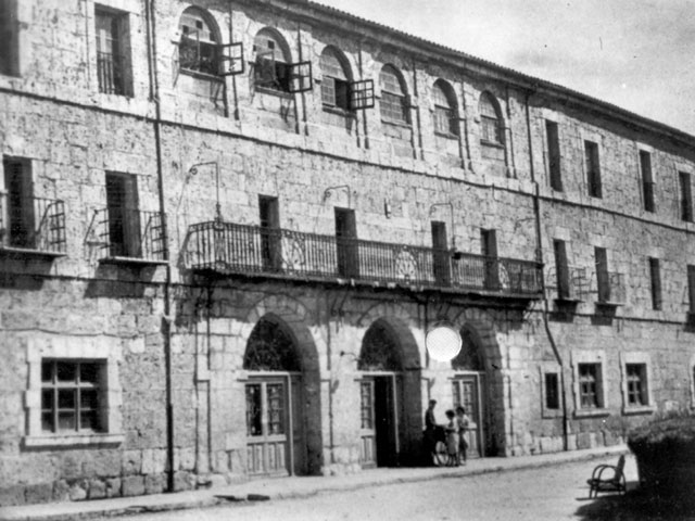 Monasterio - Abadía de Retuerta (Valladolid) - Cuaderno. Álbum de Valladolid - Fotografía 60 x 42 B/N